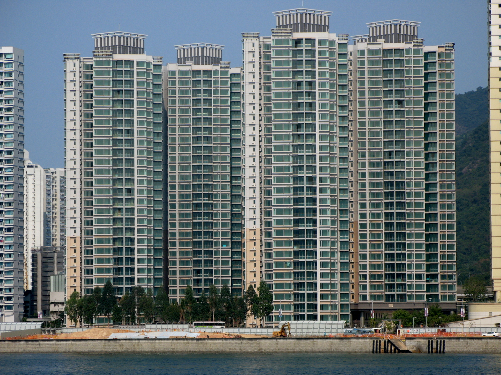 HK MOS Sausalito 嵐岸